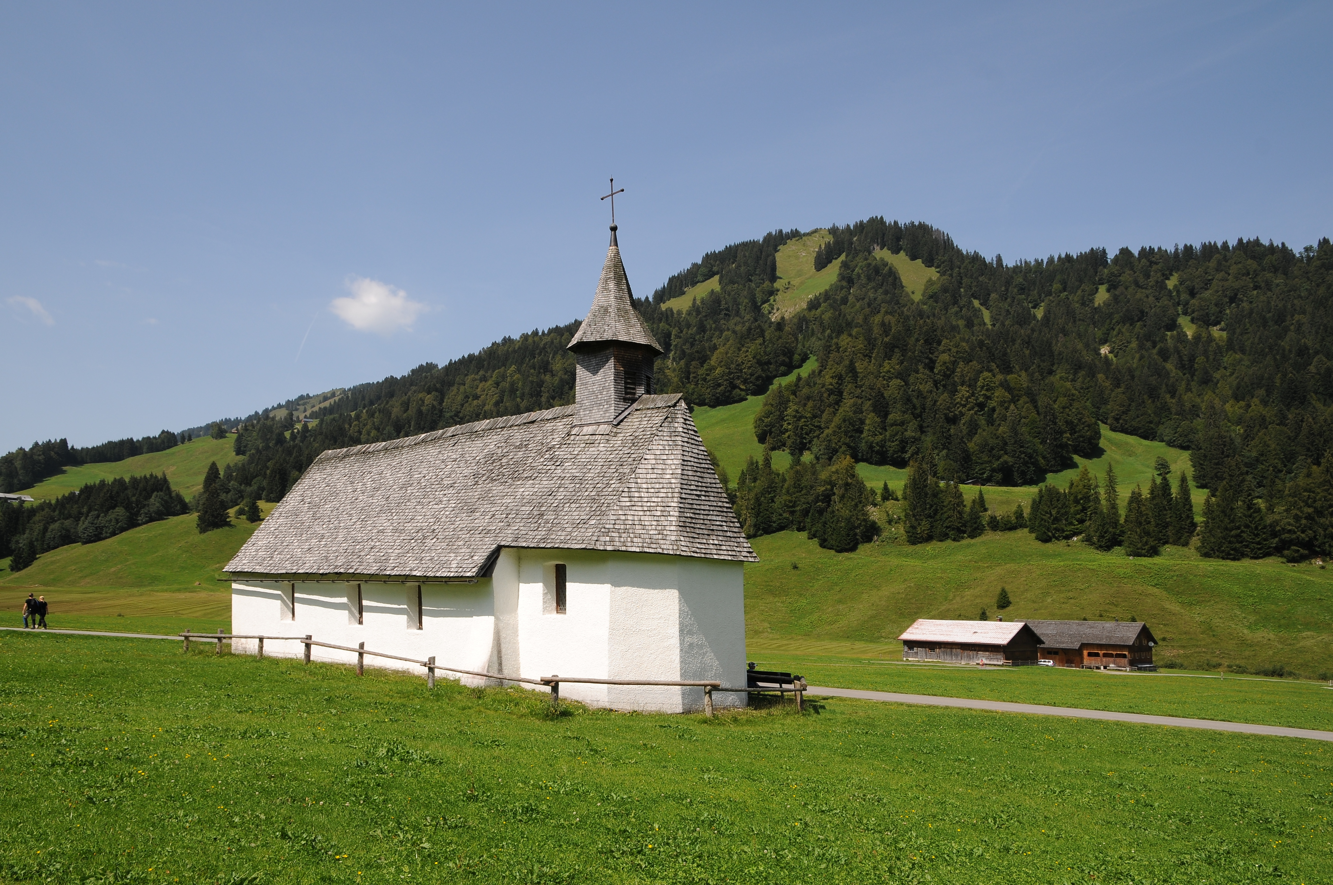 aus dem DEHIO Vorarlberg 1983: Kapelle Hl. Dreifaltigkeit, in Schönenbach, auf freiem Feld, am Ende des Bizuaer Tales. Rechteckbau mit eingezogenem 5/8-Chor, 8eckiger Glockenturm mit Spitzhelm über dem Chor. Inneres: Langer Betraum mit trapezförmiger Decke, je drei Flachbogenfenster. Eingezogener runder Chorbogen, bezeichnet 1697; Chor mit Flachdecke.